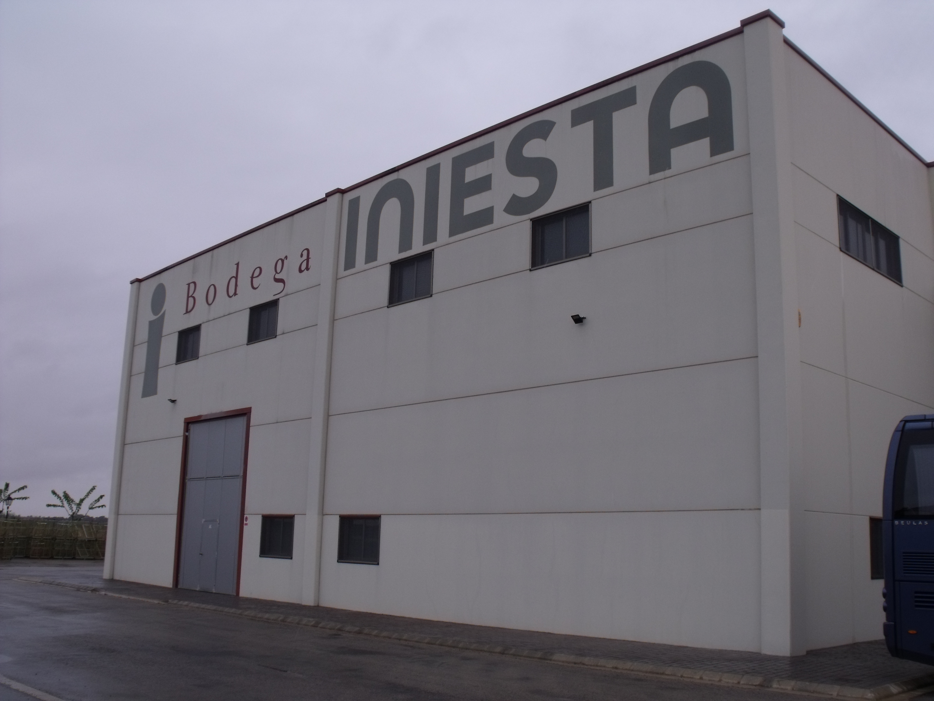 Bodegas propiedad del jugador de fútbol Iniesta